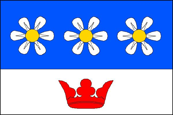 Vlajka obce Velké Kunětice